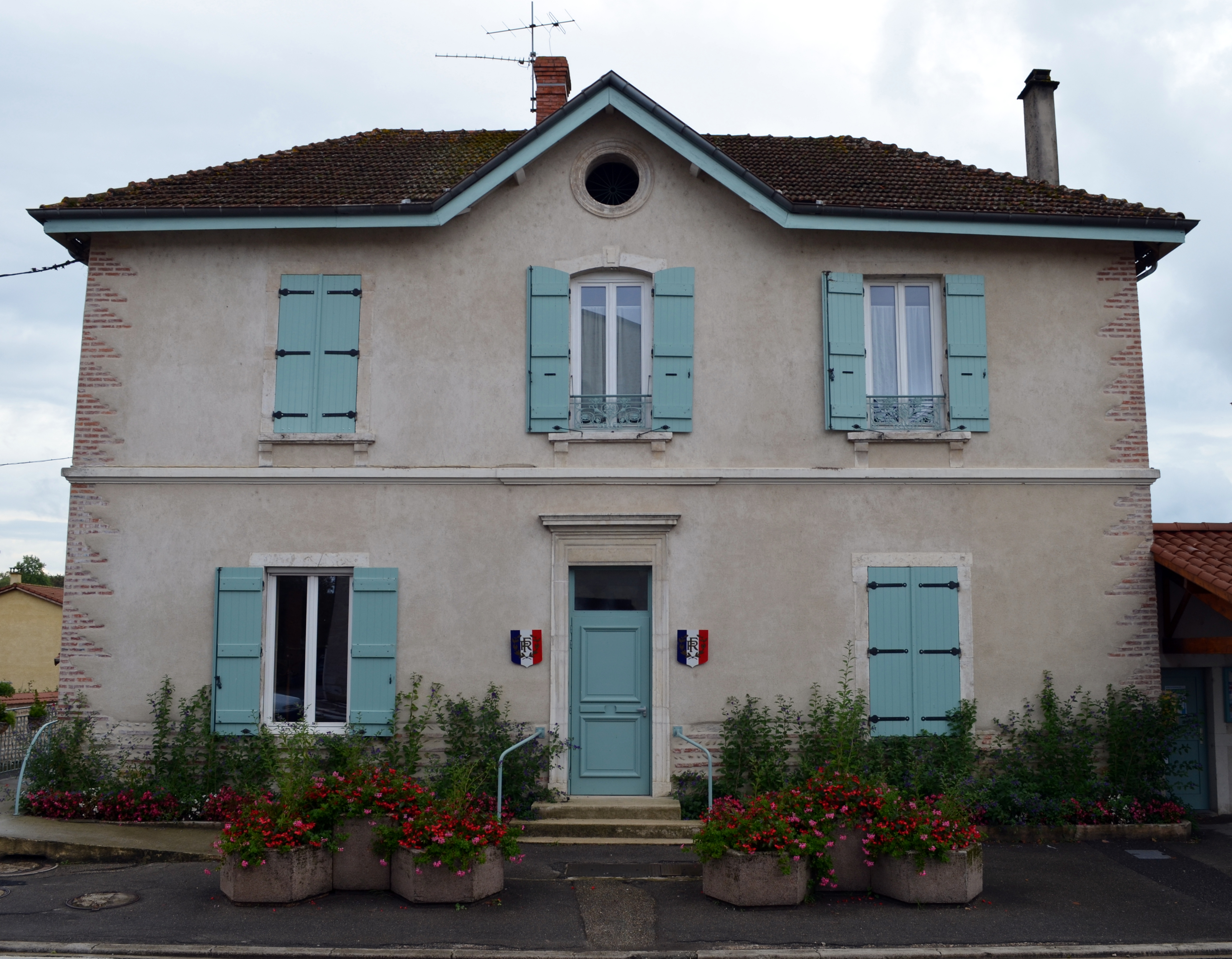 Mairie de Saint-Nizier-le-Désert.